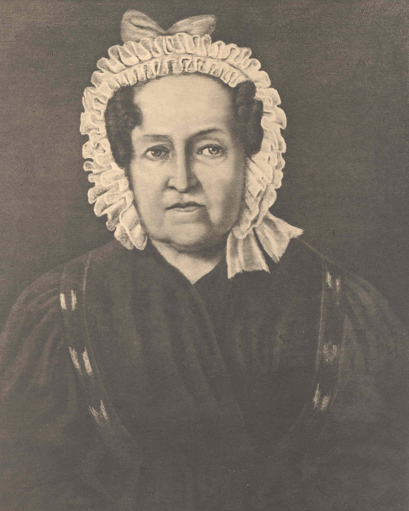 Hedvig Paus (1763-1848), Henrik Ibsens mormor (Hedevig Christine Paus)